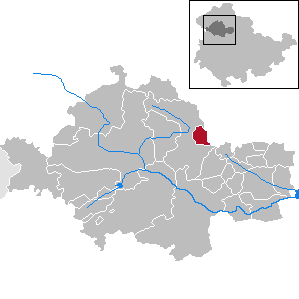 Marolterode in Thuringia - Unstrut-Hainich-Kreis